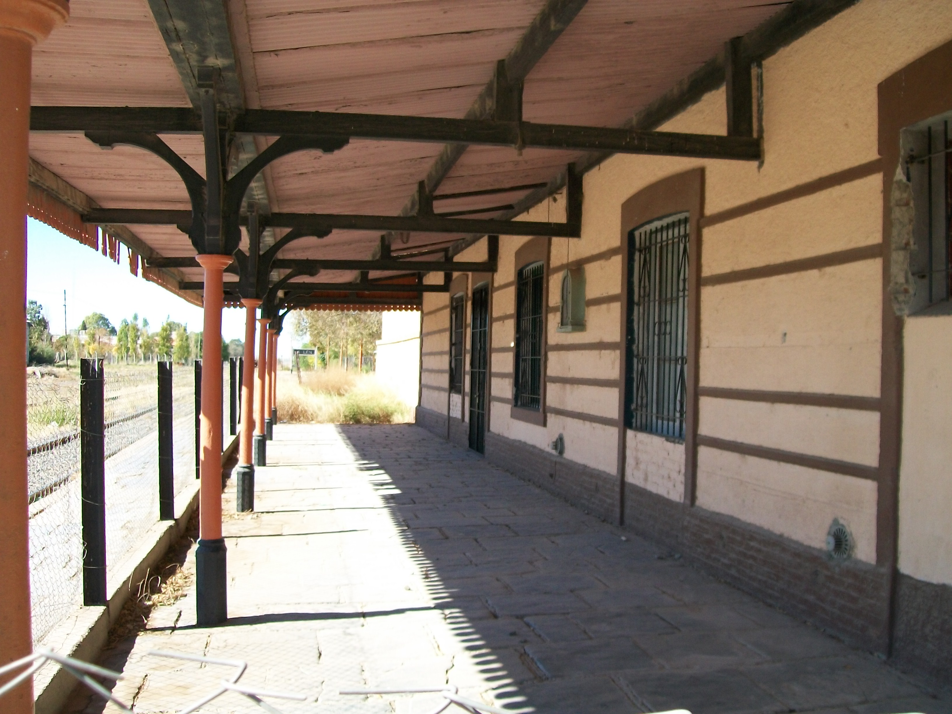 Andén de la antigua estación de trenes de la localidad de Allen, provincia de Río negro, Argentina. Ubicada en la avenida Libertad entre las calles Sarmiento y L N Alem. La primera estación fue inaugurada en mayo de 1910. Los trenes de pasajeros circularon hasta el año 1991. En 2006 se inaugura el Museo de la Ciudad en el edificio central de la antigua Estación. La restauración incluyó un vallado perimetral del andén.